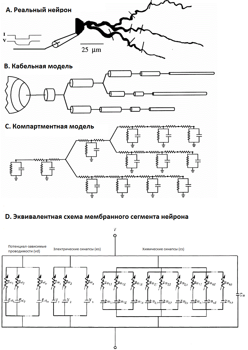 Реальный нейрон,кабельная и компартментная модели, эквивалентная схема.